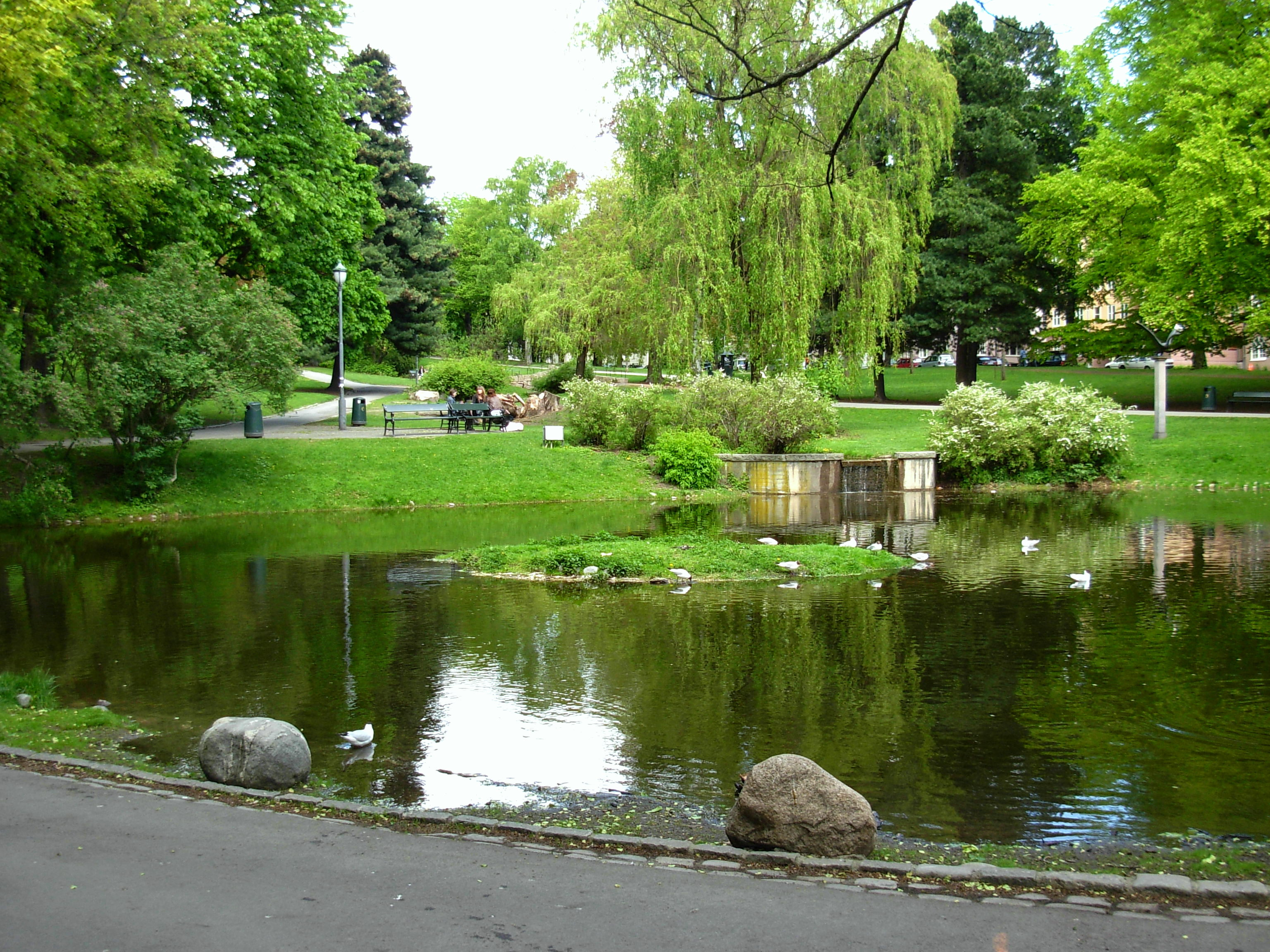 St. Hanshaugen, Oslo